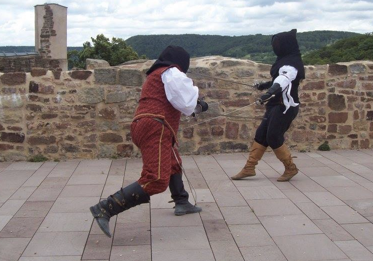 Stahlfechter der Society for Creative Anachronism beim historischen Fechten mit dem Rapier